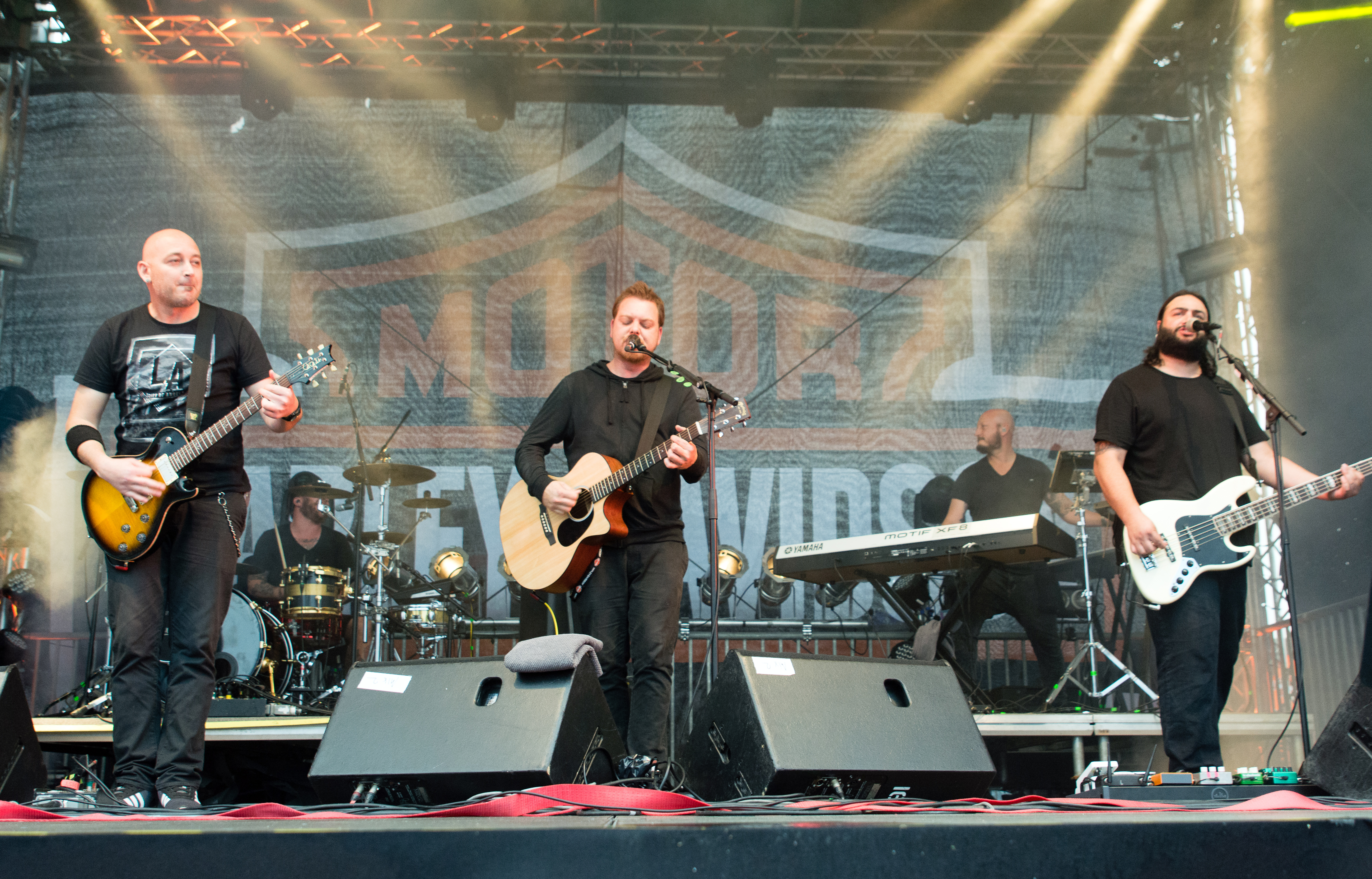 Prime Circle bei den Hamburg Harley Days 2016